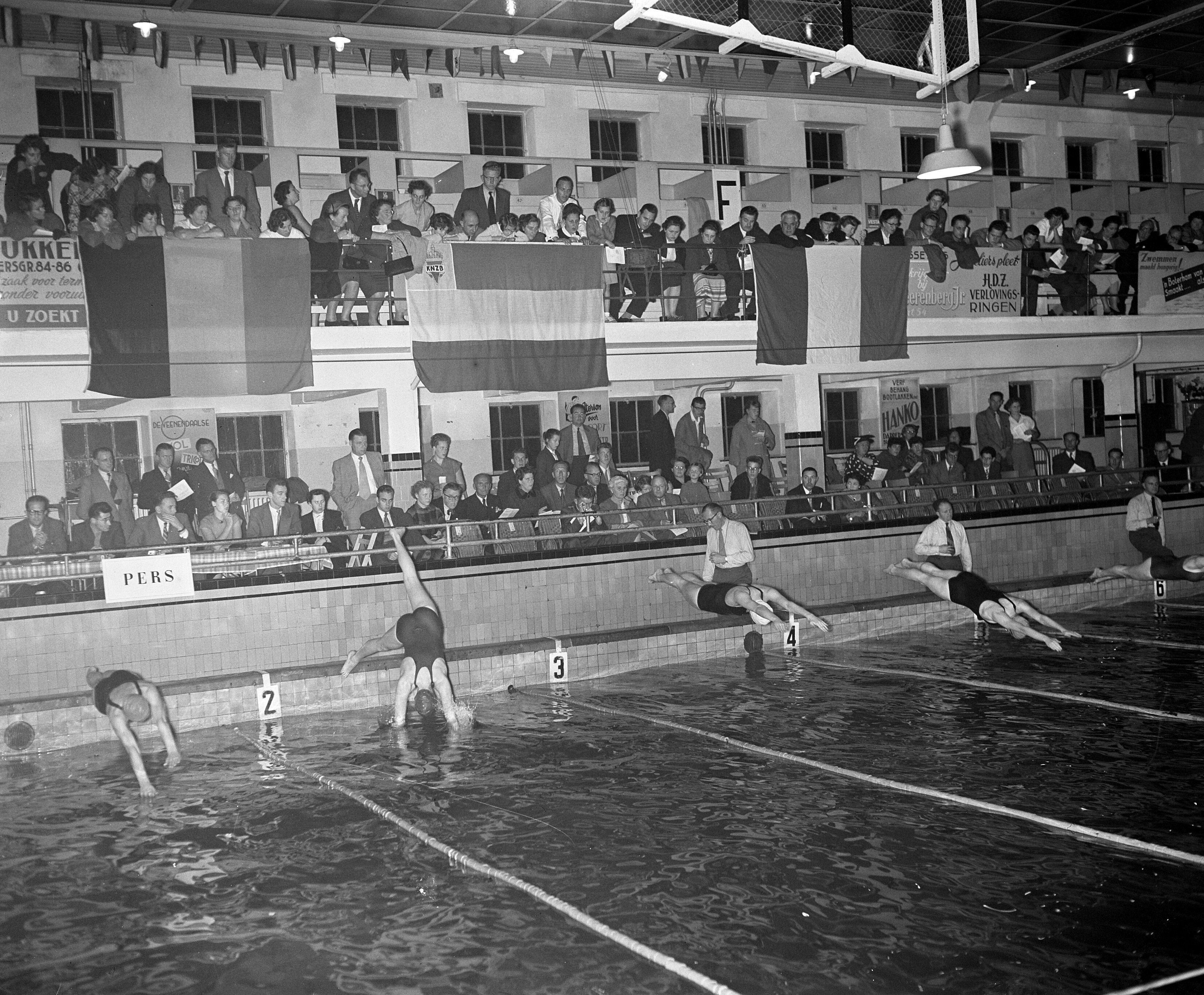 Collectie / Archief : Fotocollectie Anefo Reportage / Serie : [ onbekend ] Beschrijving : Zwemfeest sportfondsenbad Amsterdam waterpolo Meeuwen tegen BSC Datum : 9 oktober 1954 Locatie : Amsterdam, Noord-Holland Trefwoorden : WATERPOLO Persoonsnaam : MEEUWEN Fotograaf : Rossem, Wim van / Anefo Auteursrechthebbende : Nationaal Archief Materiaalsoort : Glasnegatief Nummer archiefinventaris : bekijk toegang 2.24.01.09 Bestanddeelnummer : 906-7739